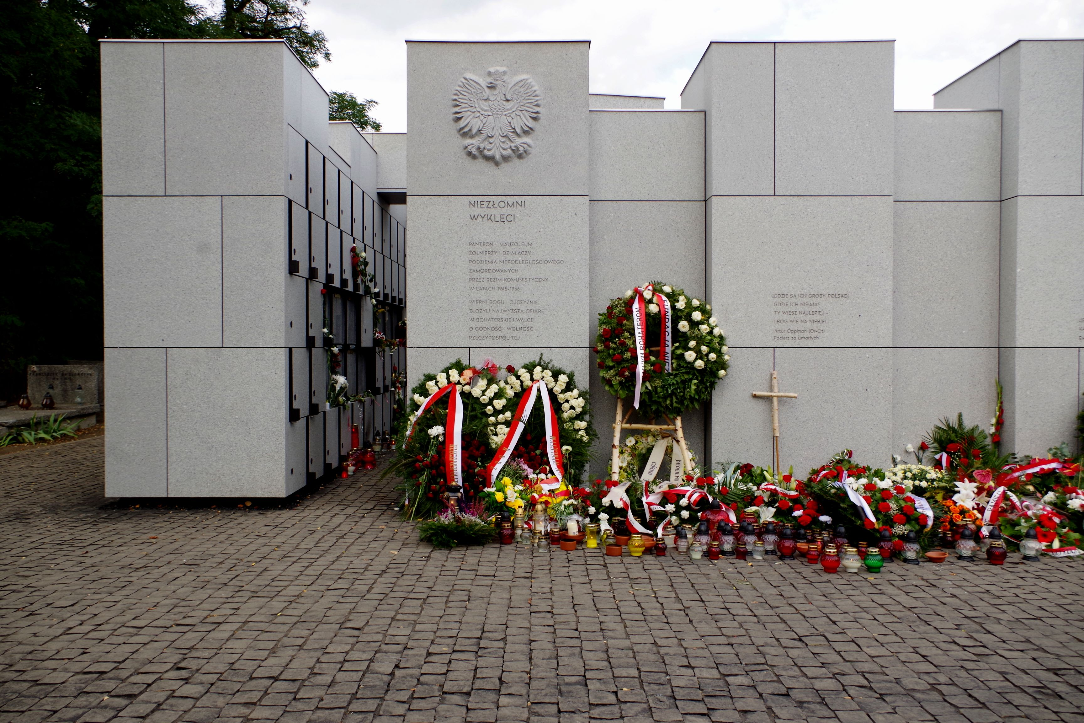 Panteon – Mauzoleum Wyklętych-Niezłomnych na Cmentarzu Wojskowym na Powązkach w Warszawie.